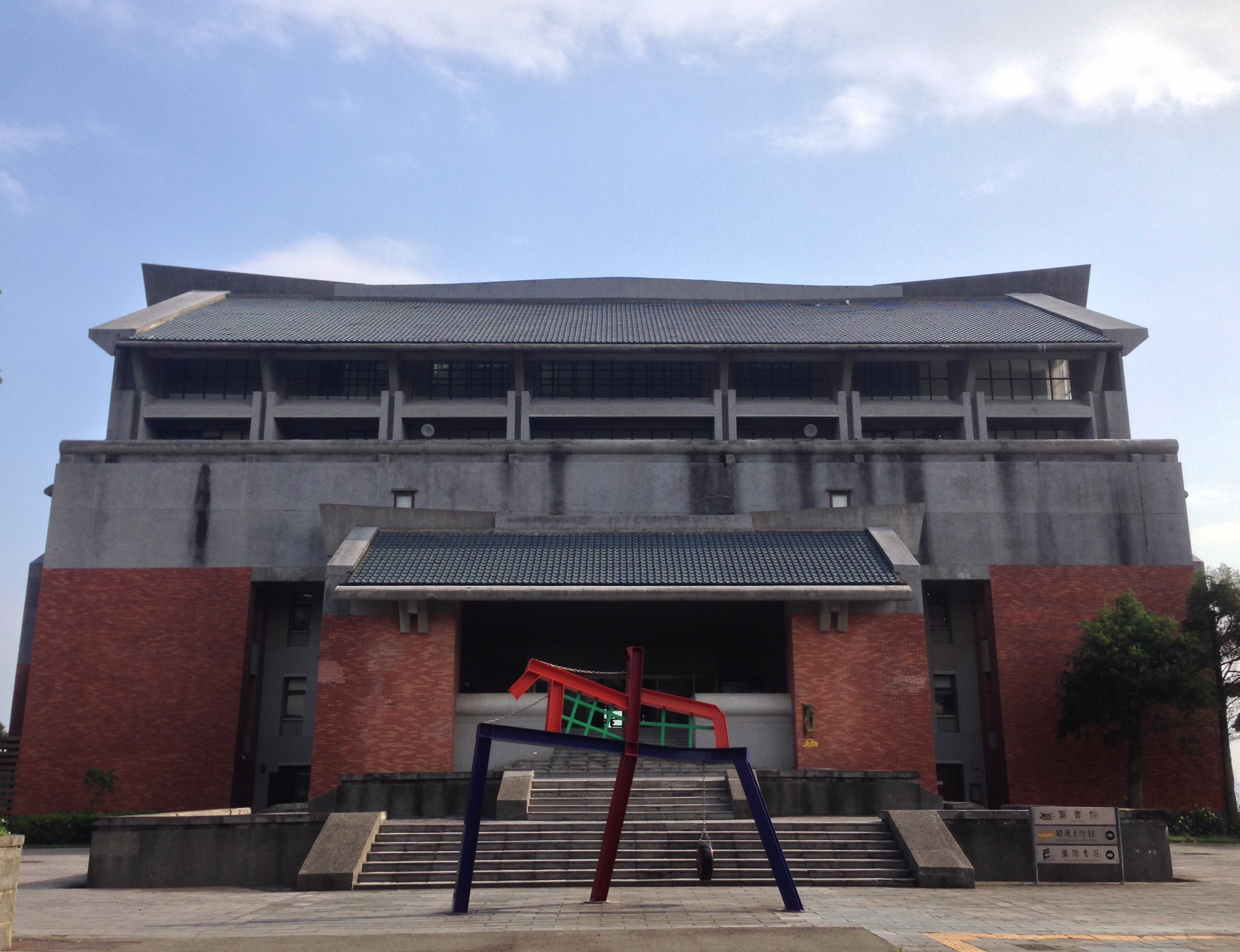 中文（台灣）: 台北藝術大學圖書館